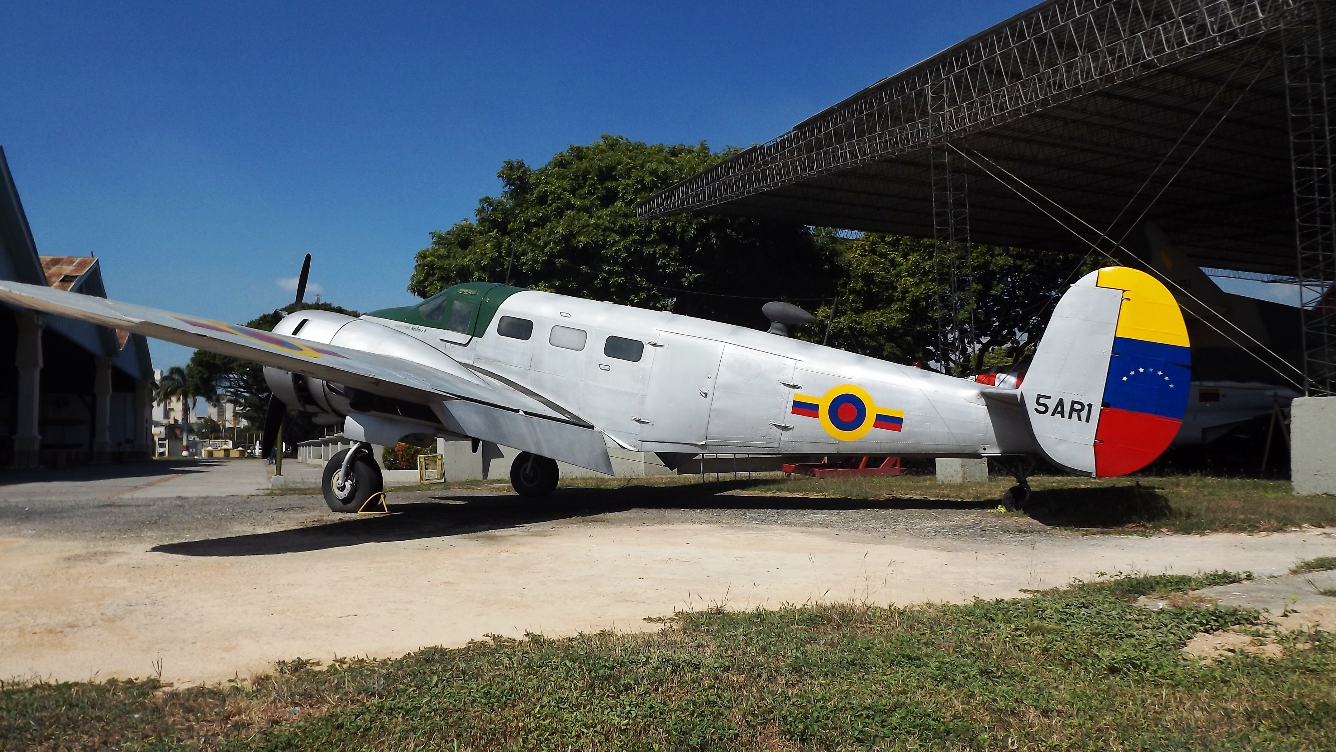 5AR1 Beechcraft D-18S - Luis Hernán Paredes Aeronautical Museum of Maracay - Venezuela